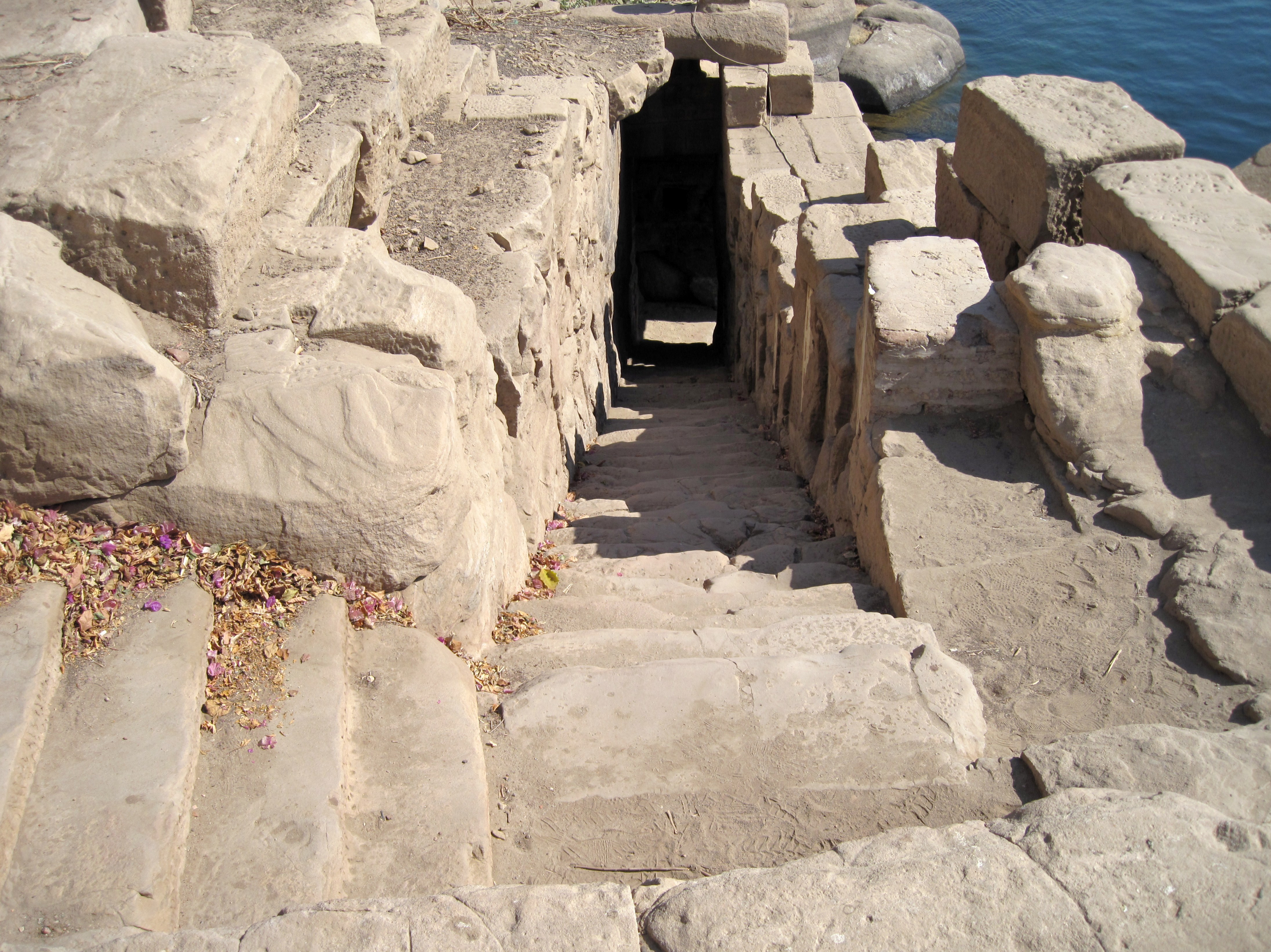 Nilometer an der Südostseite der Insel Elephantine in Assuan, Ägypten